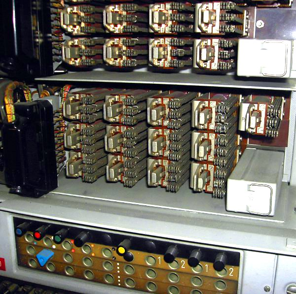 Das Bild zeigt das System EMK, ein Vorläufer vom EMD System. Es ist der Relaissatz des OFLW (Ortsfernleitungswähler) zu sehen. EMK = Edelmetall-Motor-Koordinatenwähler. Dieser Wähler wurde von Siemens in Berlin entwickelt und war in zwei Ämtern in Berlin im Einsatz.